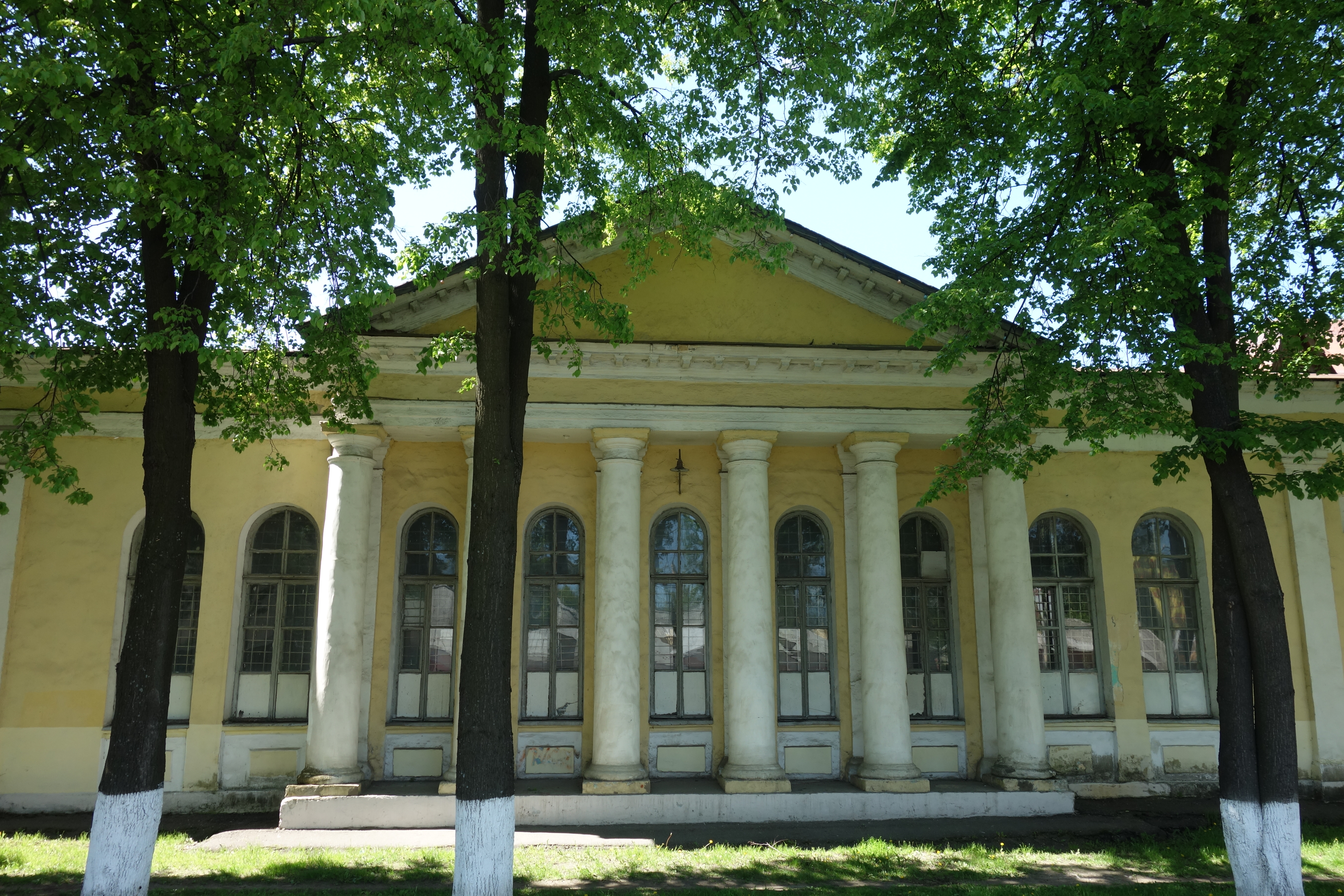 Georgij Ivanov. Kadettenkorps in Jaruslawl